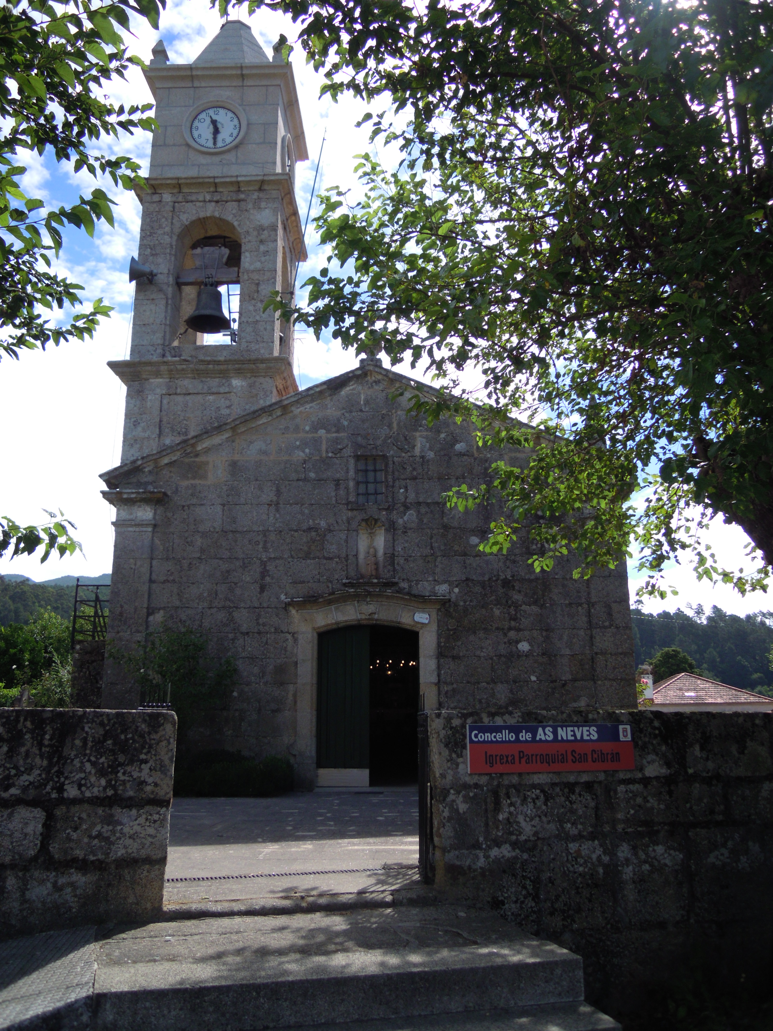 Igrexa de San Cibrán de Ribarteme (As Neves)